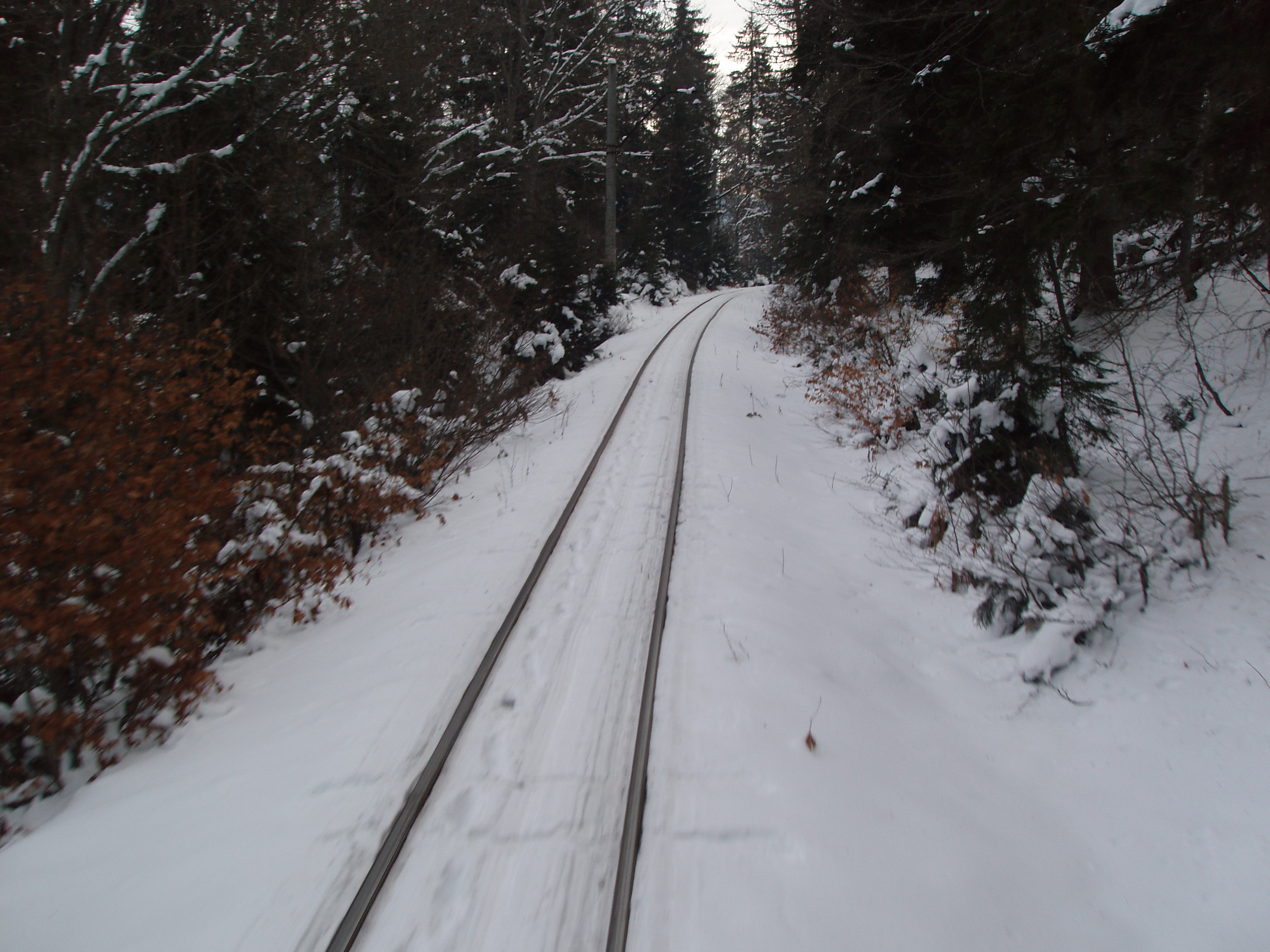 Узкоколейная железная дорога Боржоми - Бакуриани